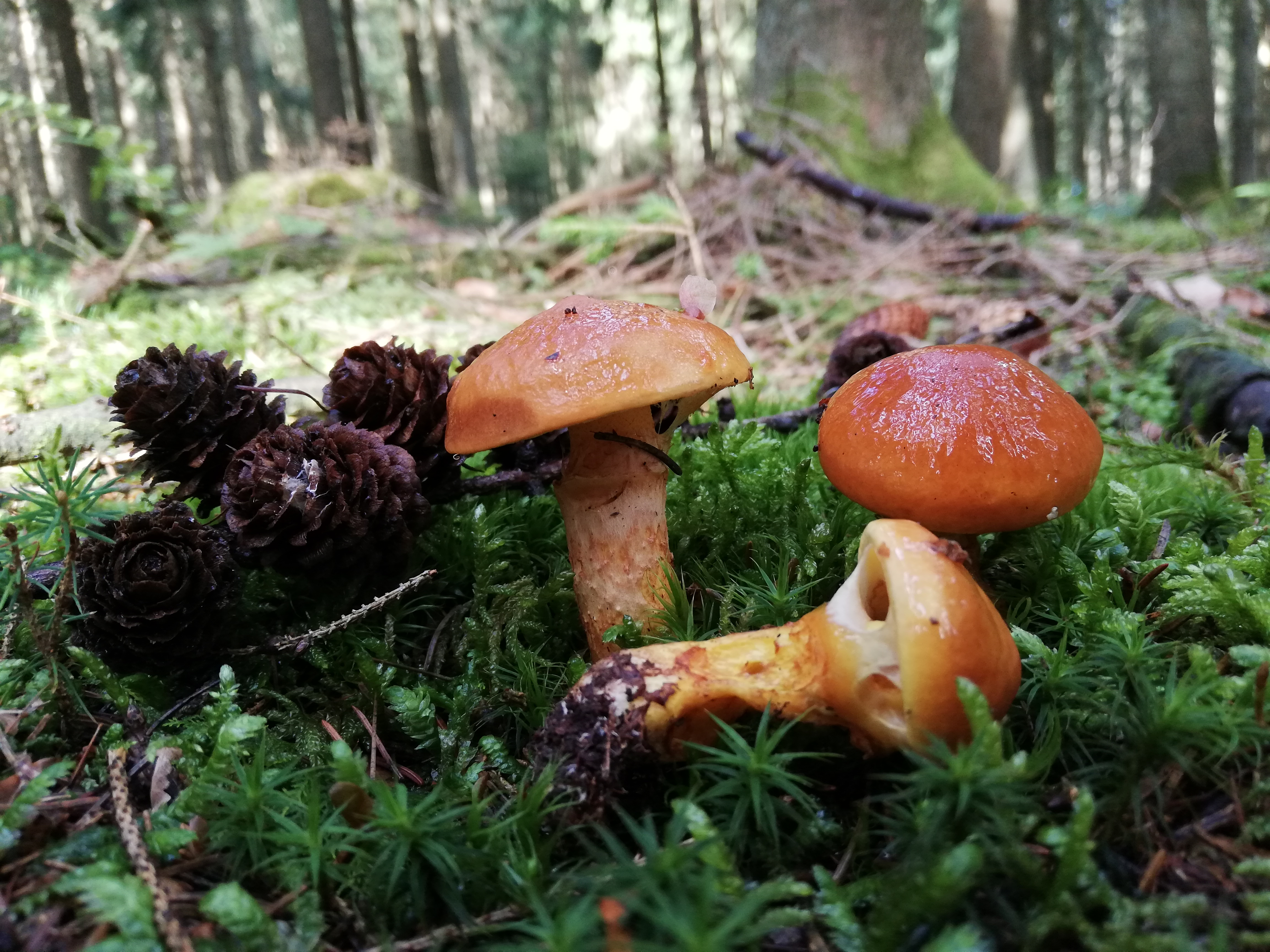 Owocniki maślaka żółtego